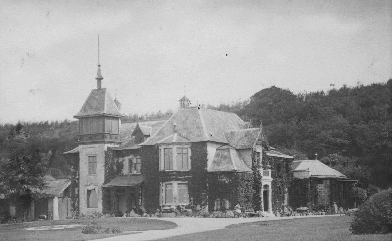 Hamilton House i Helsingborg, byggt 1869.